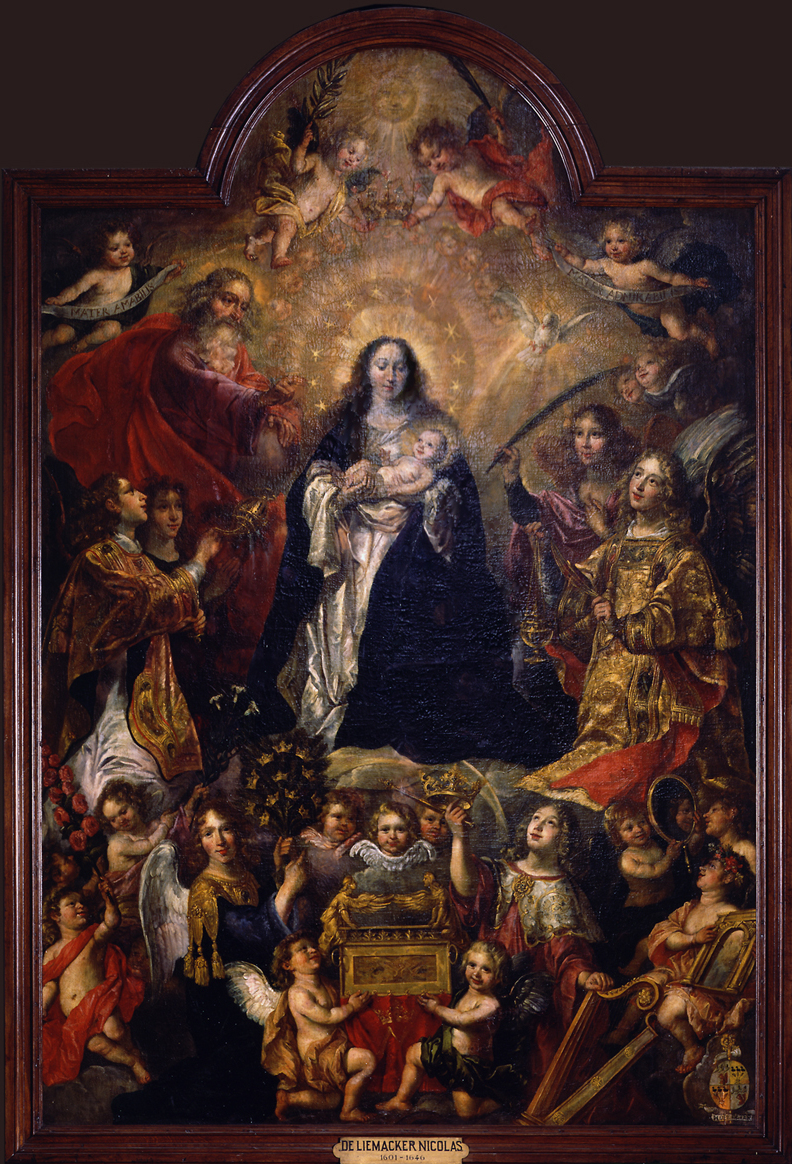 Sint-Walburgakerk, Oudenaarde, Belgium